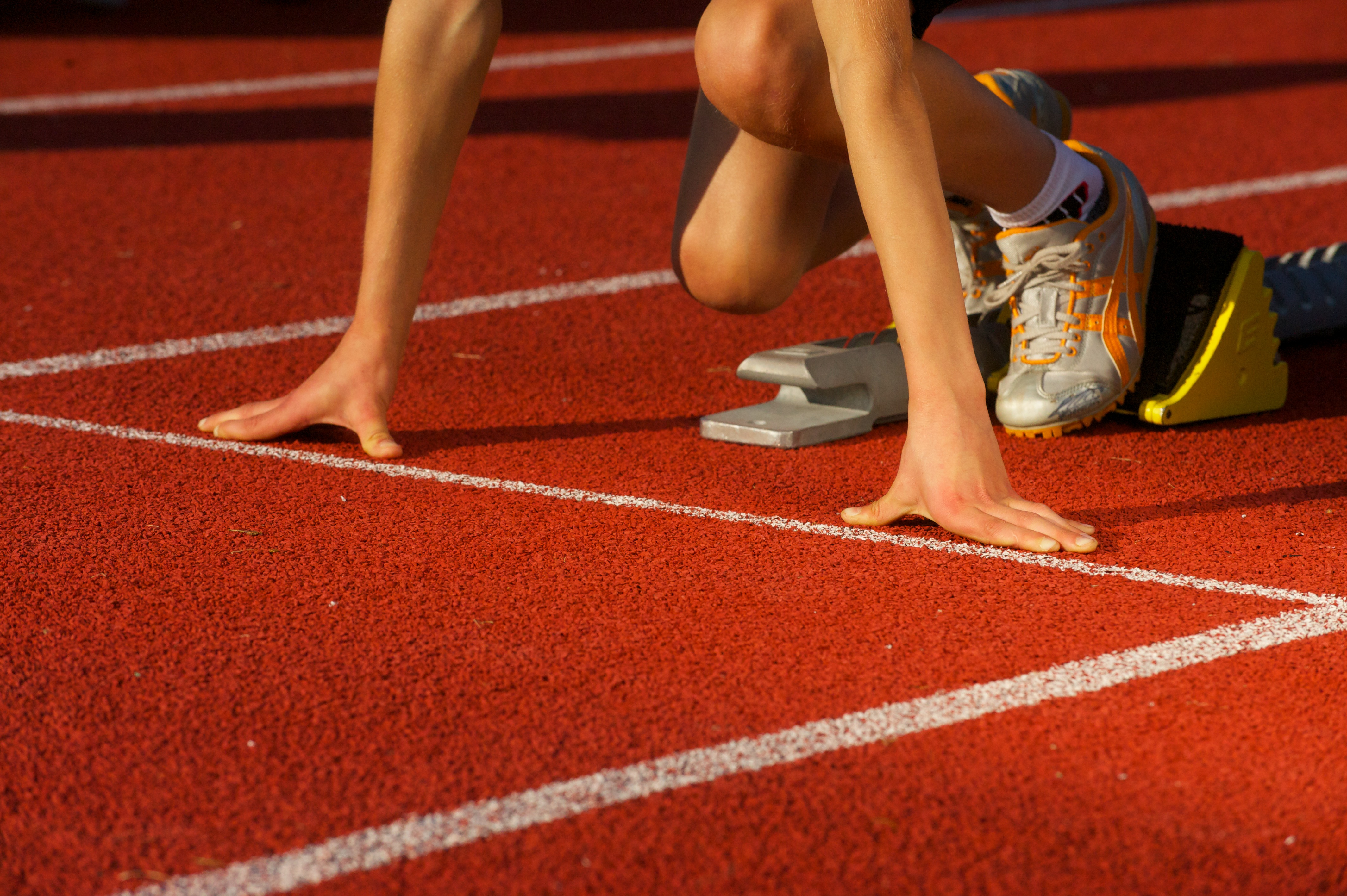 Leichtathletiklaufbahn